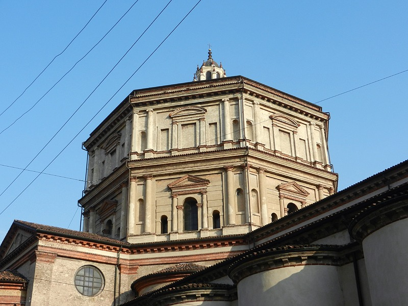 Milano - Cupola della Chiesa di S. Maria della Passione